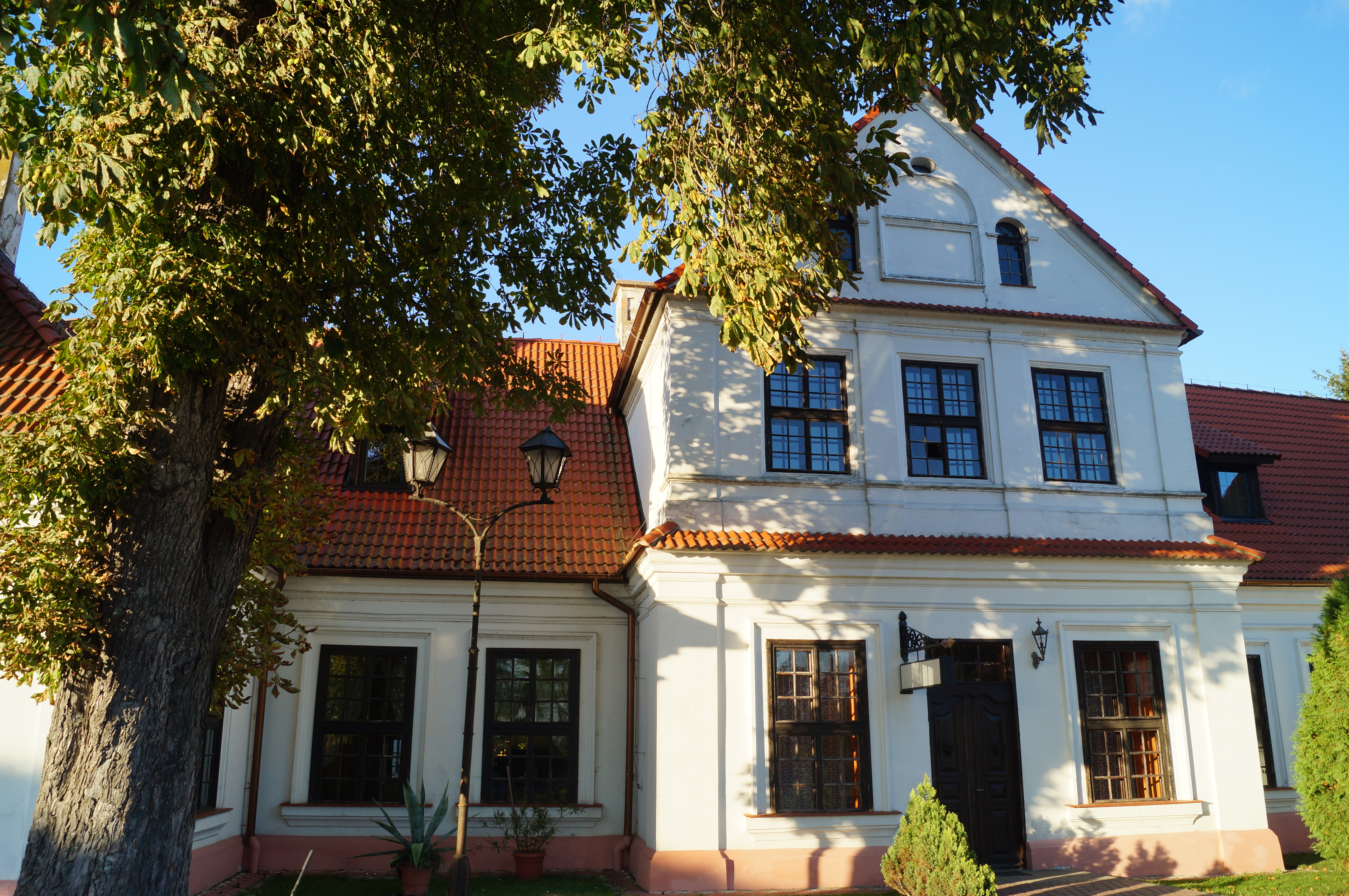 Nowa Wieś Szlachecka - dwór Tyzenhausów, następnie Czapskich z XVI w., rozbudowywany: w XVII w. na parterowy z narożnymi alkierzami, w XVIII w. o skrzydła boczne. Główne wejście (zabytek nr rejestr. A/525)